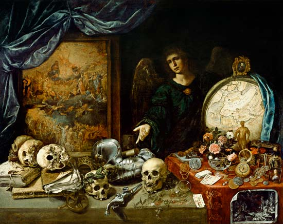 Vanitas